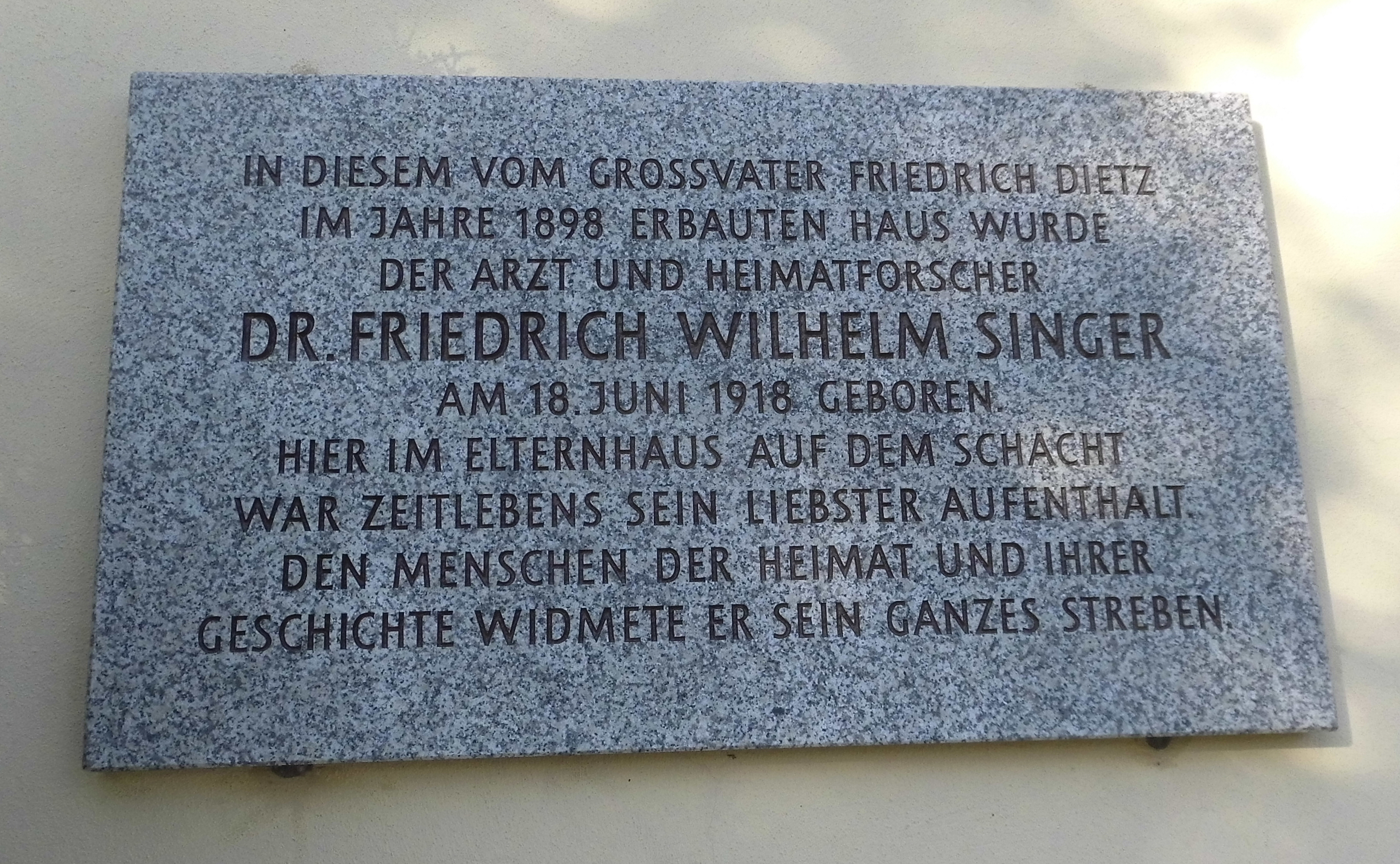 Gedenktafel für den Arzt und Heimatforscher Friedrich Wilhelm Singer an seinem Geburtshaus am Schacht bei Arzberg.